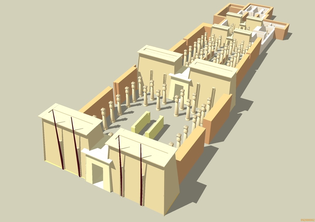 Proposition d'élévation du grand temple d'Amon de Napata à la période napatéenne